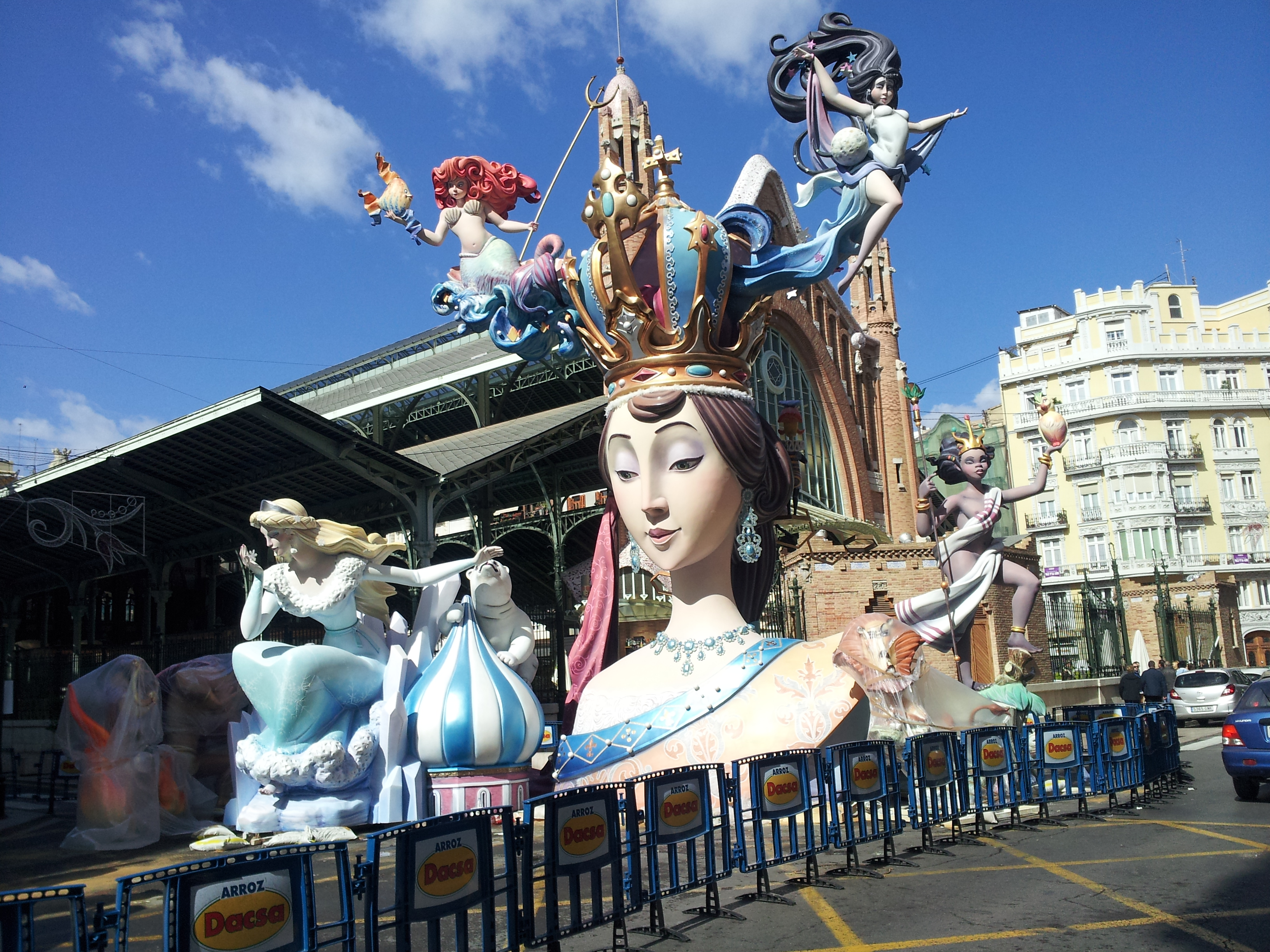 Comte de Salvatierra - Ciril Amorós